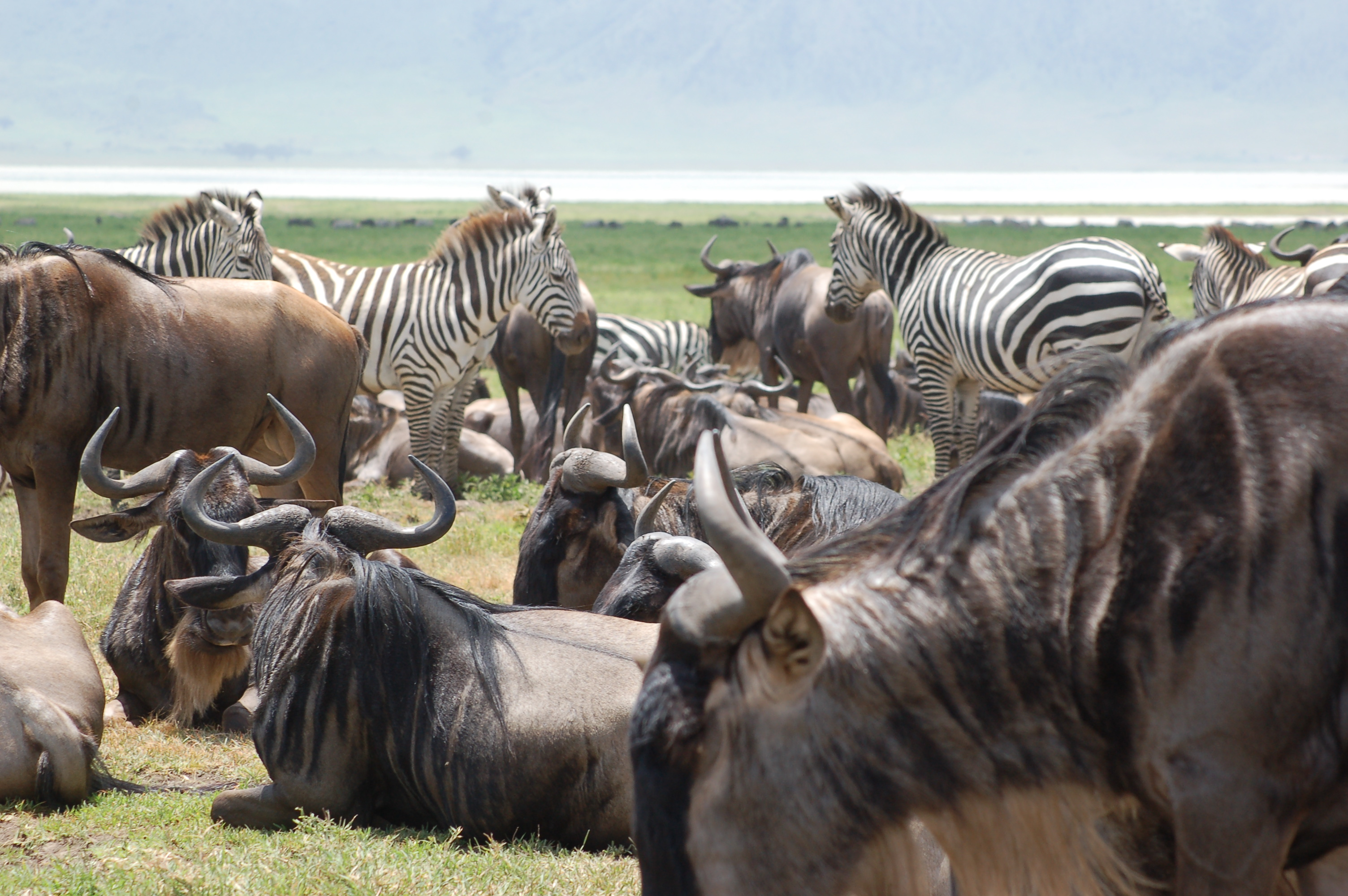 Ngorongoro Crater, Tanzania